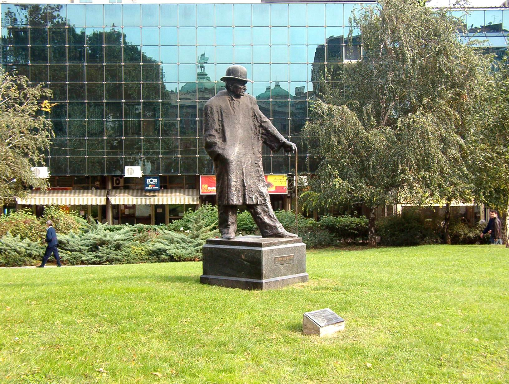 Бранислав Нушић, комедиограф Fotografisao Goldfinger. U javnoj upotrebi!